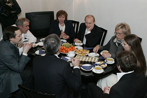 МОСКВА, ТЕАТР «СОВРЕМЕННИК». С актёрами и режиссёром после премьеры комедии Грибоедова «Горе от ума». В верхнем левом углу Сергей Гармаш.